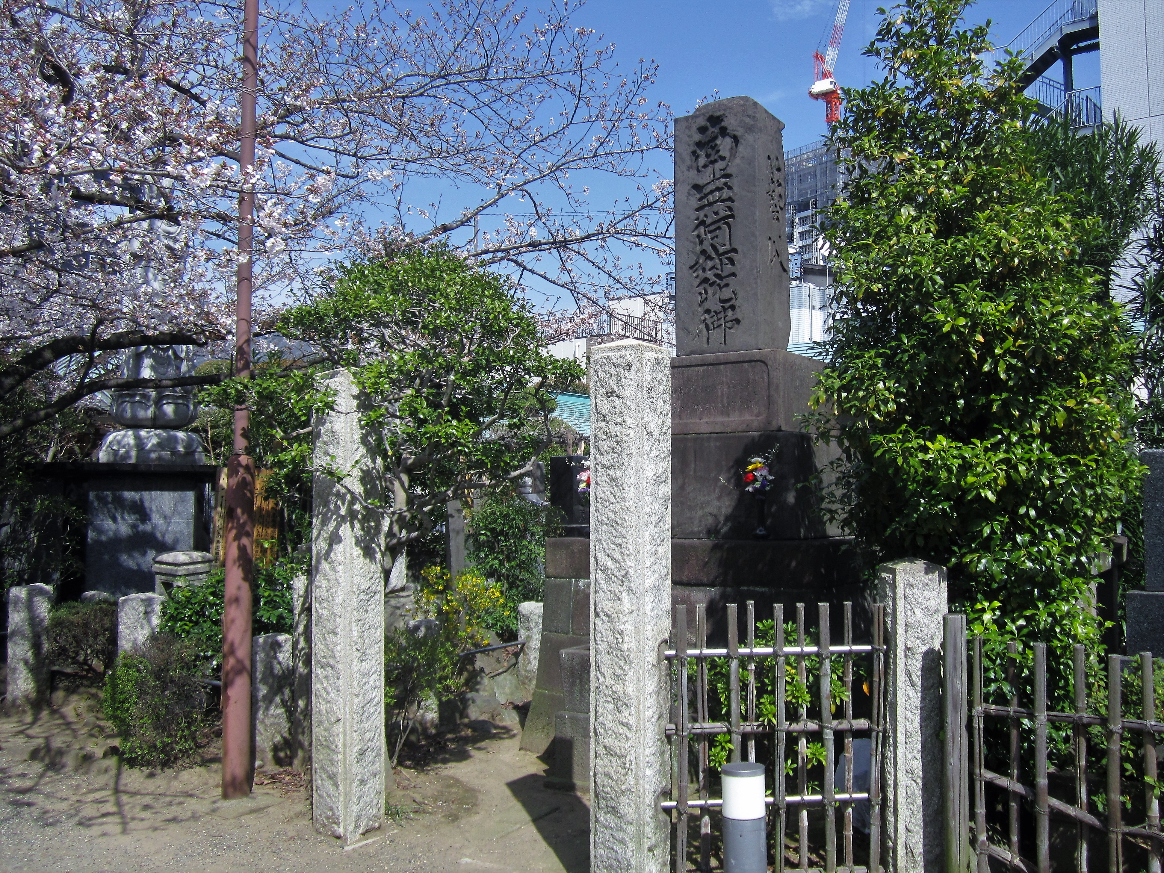 不動院の芸州供養塔（足立区千住）